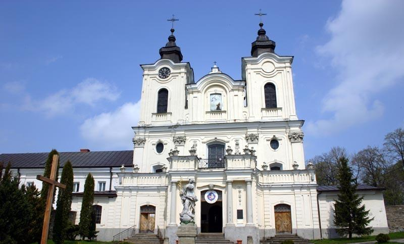 Dukla, Polska